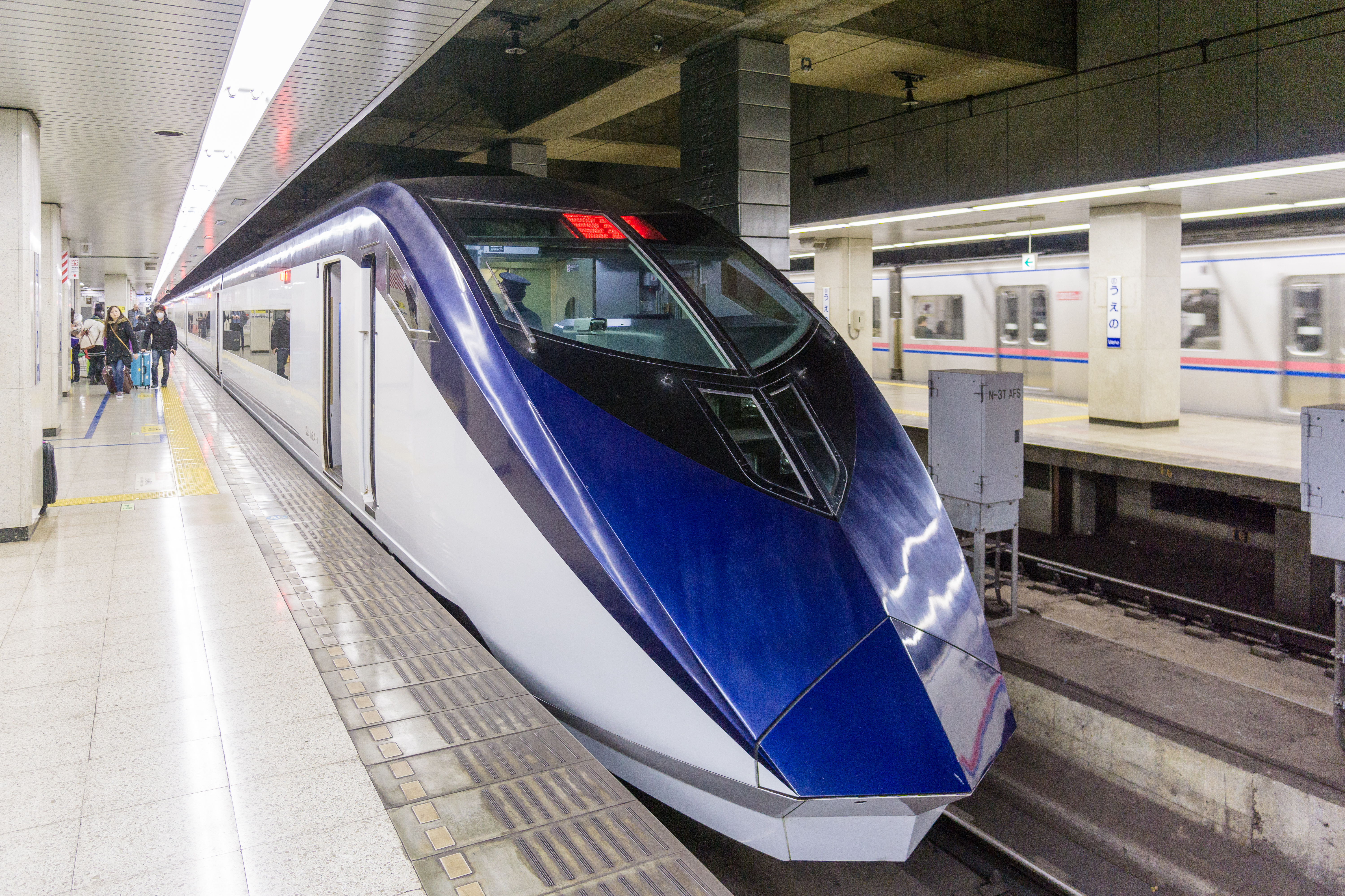 京成上野駅 / Keisei Ueno Station